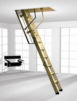 Produkt der Roto Frank AG